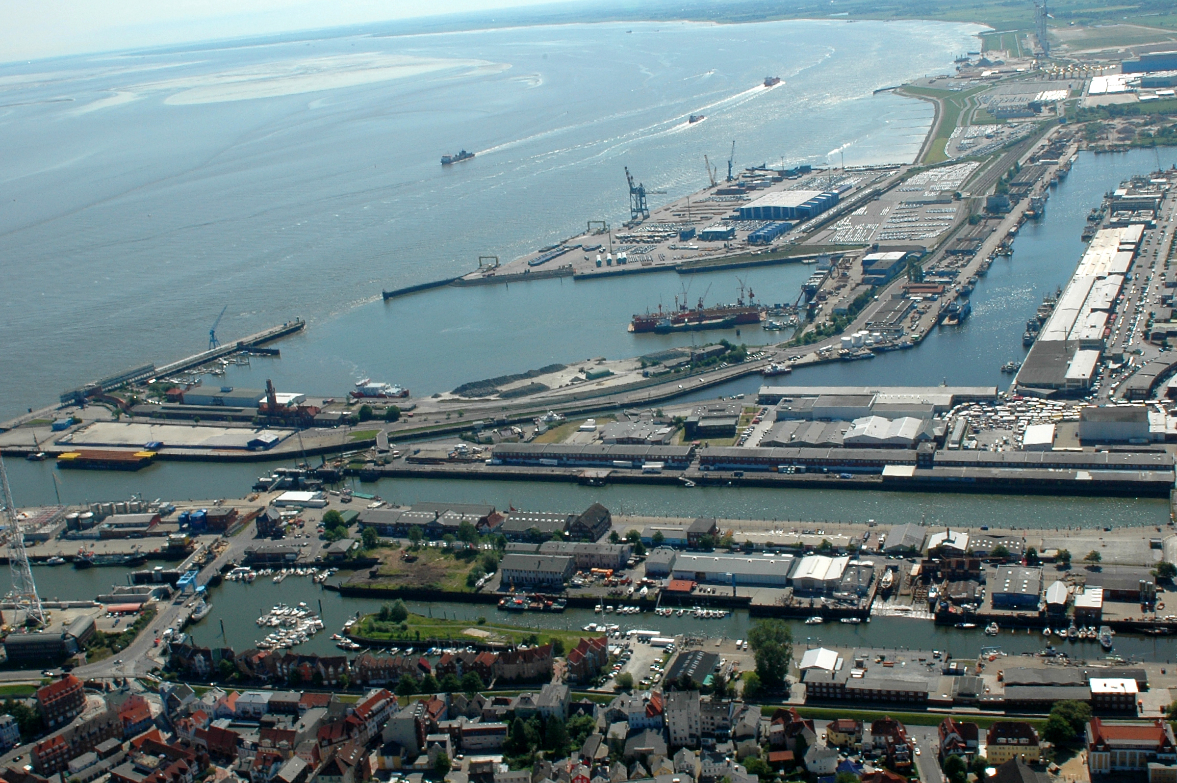 Cuxhavener Hafenanlagen mit Amerikahafen, Neuem und Altem Fischereihafen, City-Marina und Schleusenpriel Fotoflug vom Flugplatz Nordholz-Spieka über Cuxhaven und Wilhelmshaven